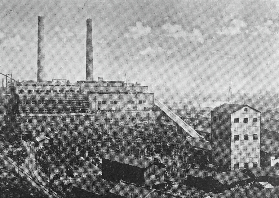 港第二発電所（1947年竣工）